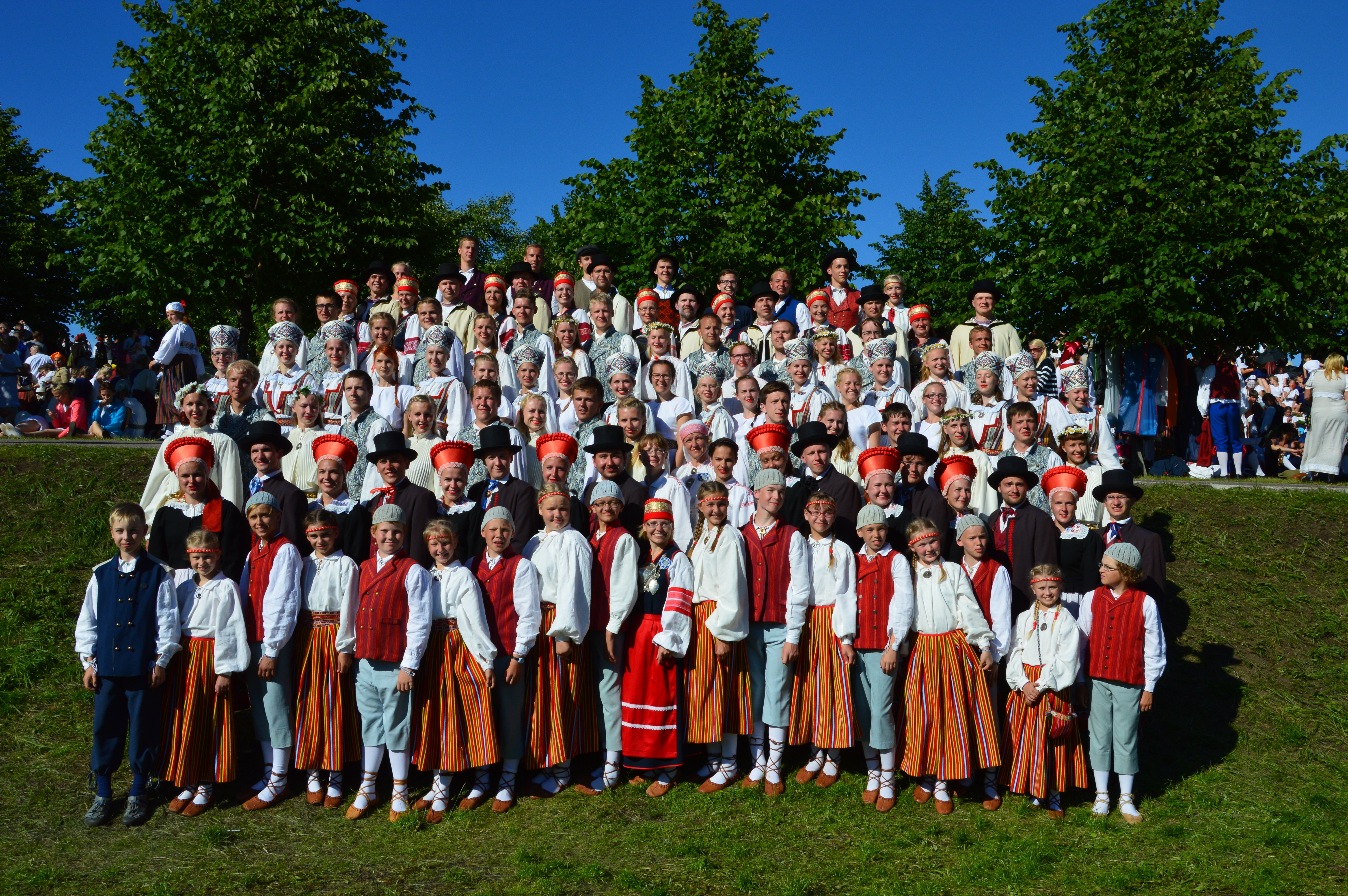 Tartu Ülikooli Rahvakunstiansambel XIX üldtantsupeol Kalevi keskstaadionil 2014. aastal.